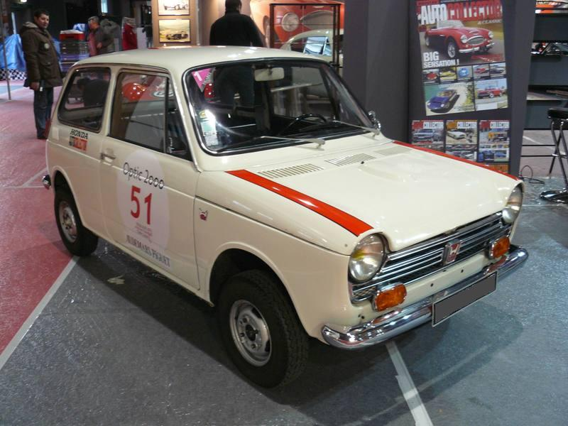 Retromobile 2012